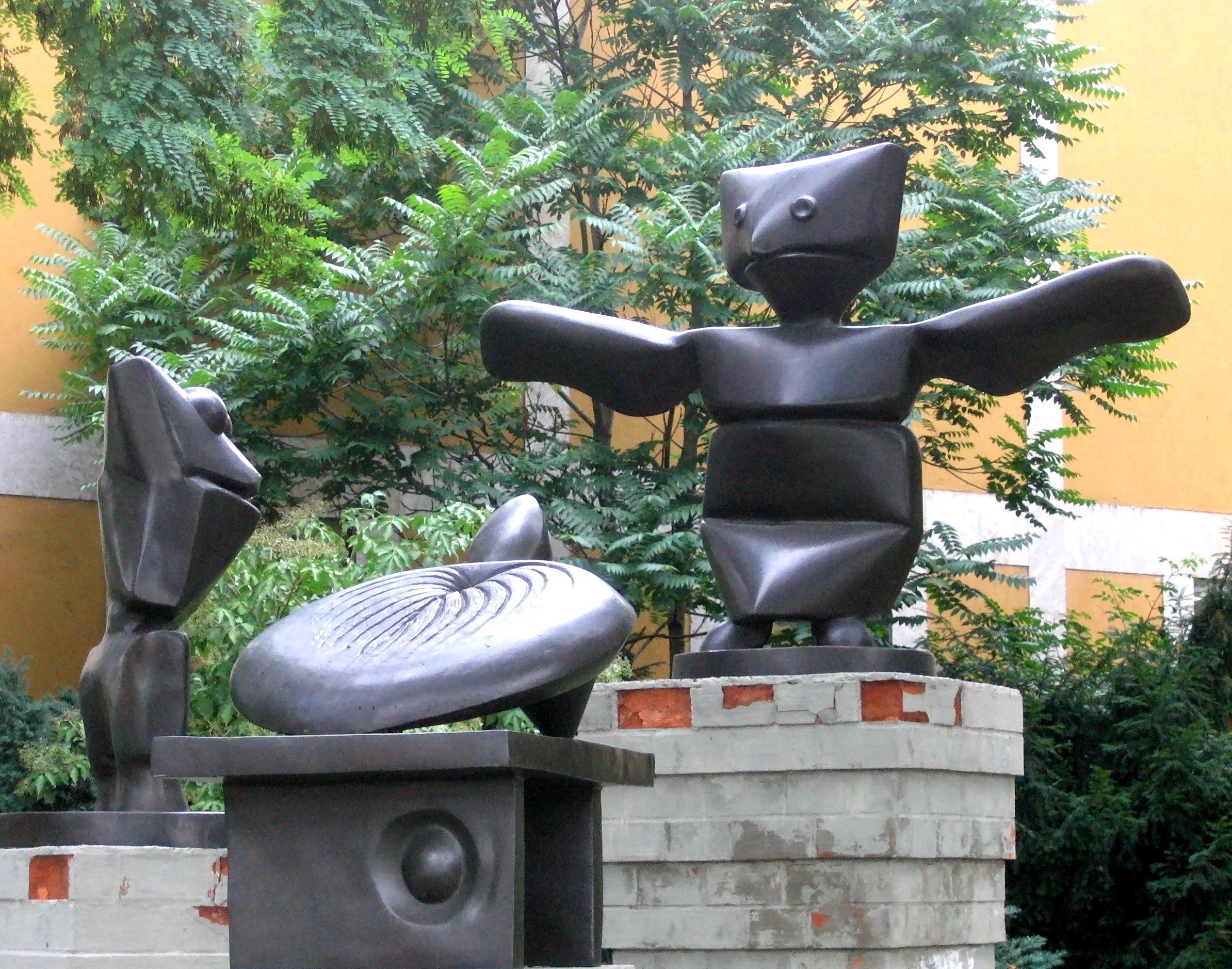 Max Ernst: Der Assistent, Der Frosch, Die Schildkroete, 1967, steht vor dem Lenbachhaus in Muenchen